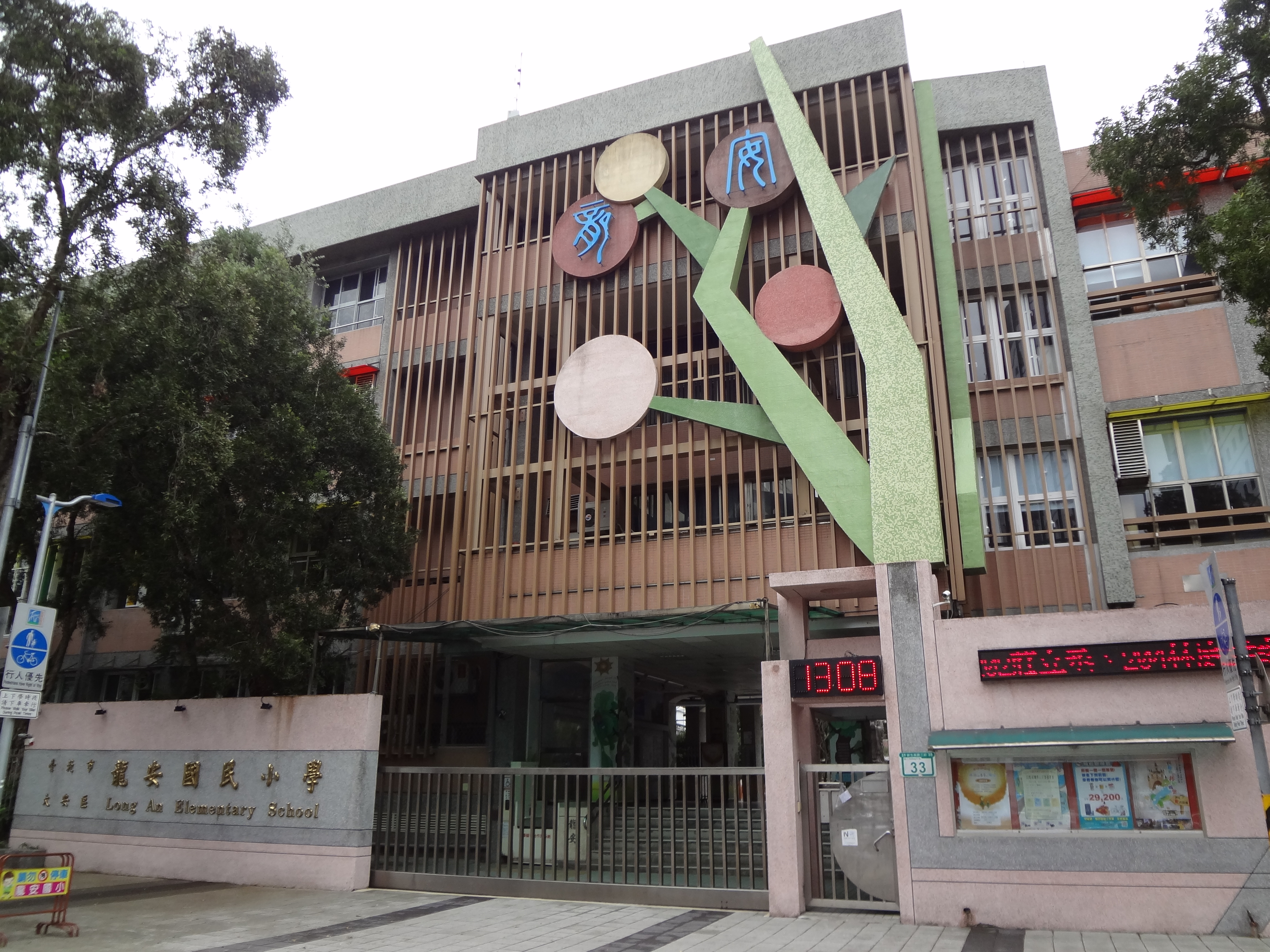 臺北市大安區龍安國民小學，位於臺北市大安區新生南路三段33號。